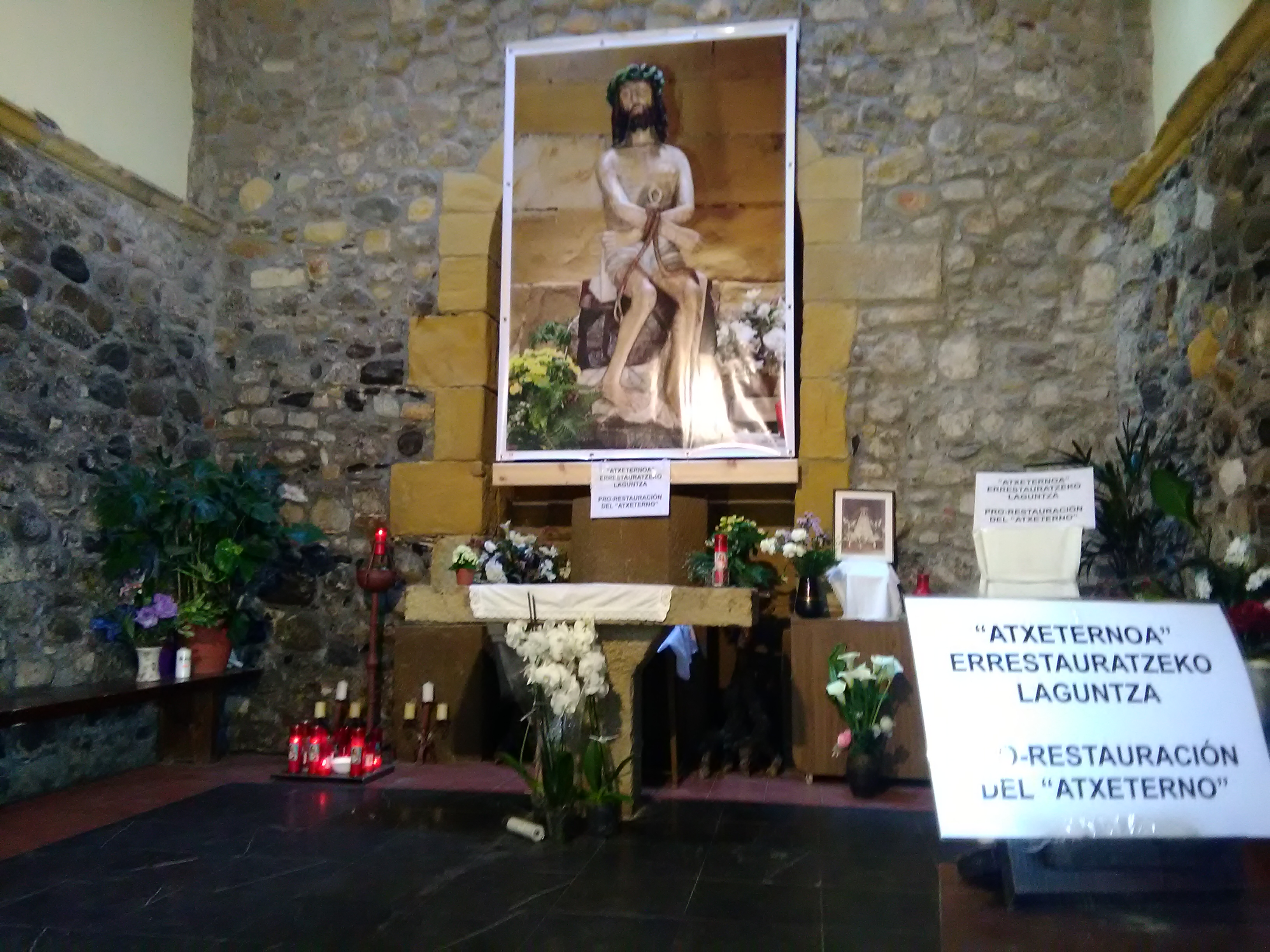 Pietatearen Aitaren kapera (Ondarroa). Beste izenez: Aita Eternoa, Atte Eternu, Aita Piedadekoa, Atte Pirere. XIV gizaldiko eraikina, aintzinan hiribilduaren sarrera nagusia izan zena Gipuzkoa aldetik.